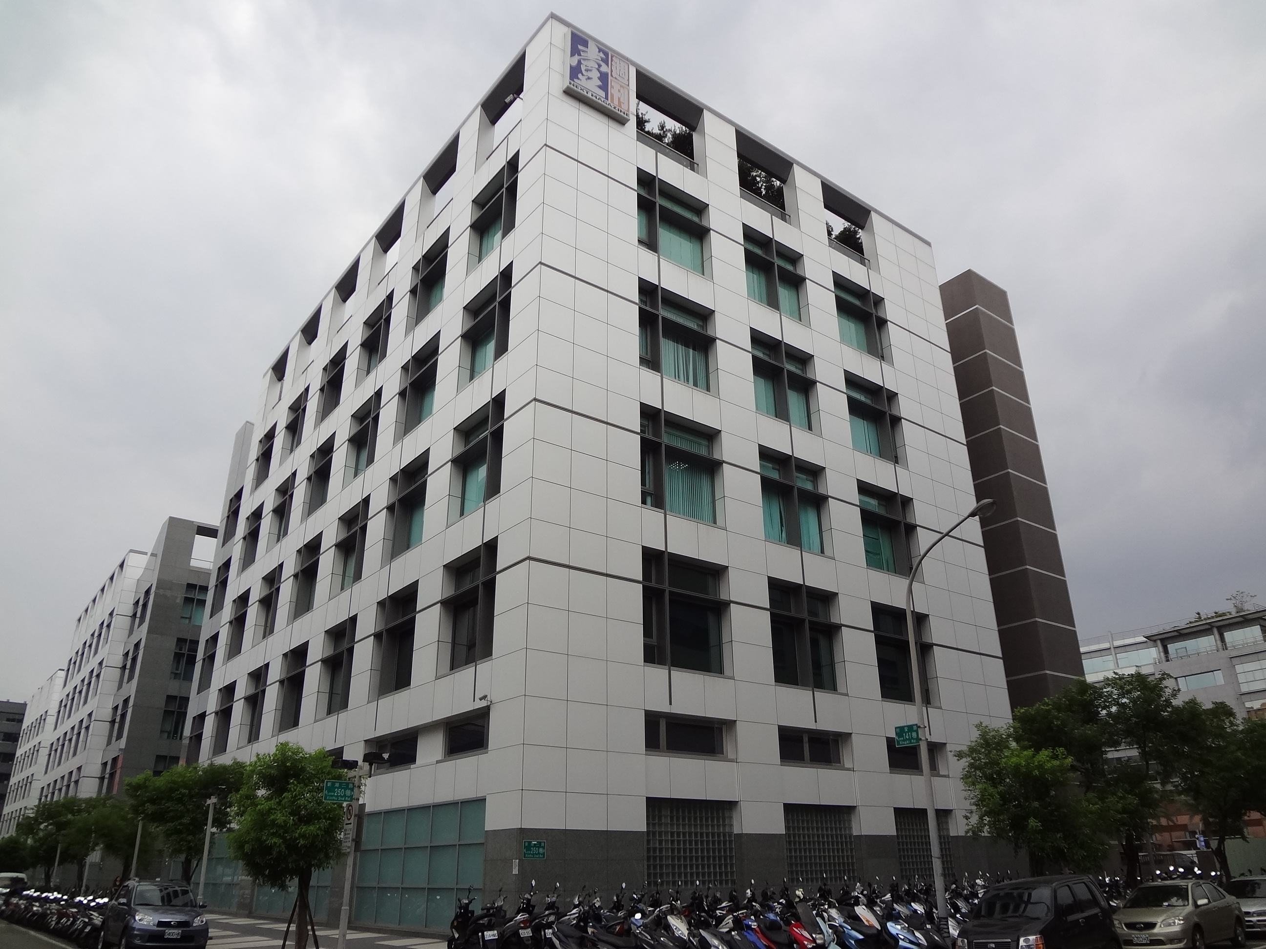 台灣壹週刊總部，地址：臺北市內湖區行愛路141巷48號。